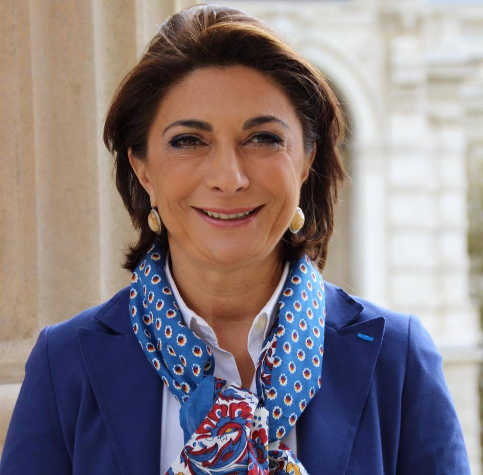 Martine Vassal